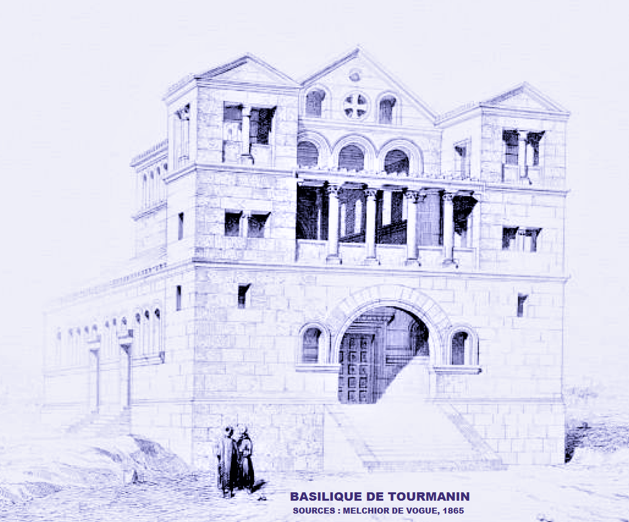 Basilique de Tourmanin - Syrie, reconstitution (image du domaine public (De Vogüé) modifiée)